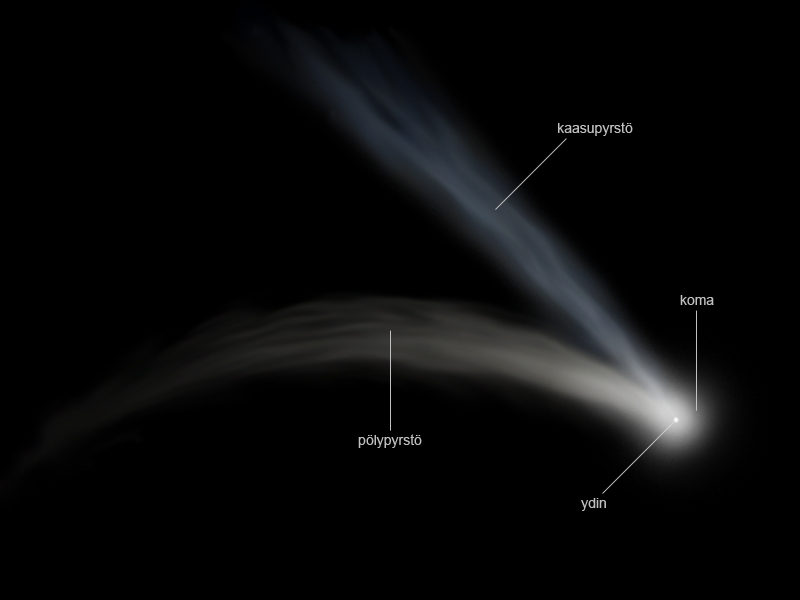 Komeetan ulkoinen rakenne.